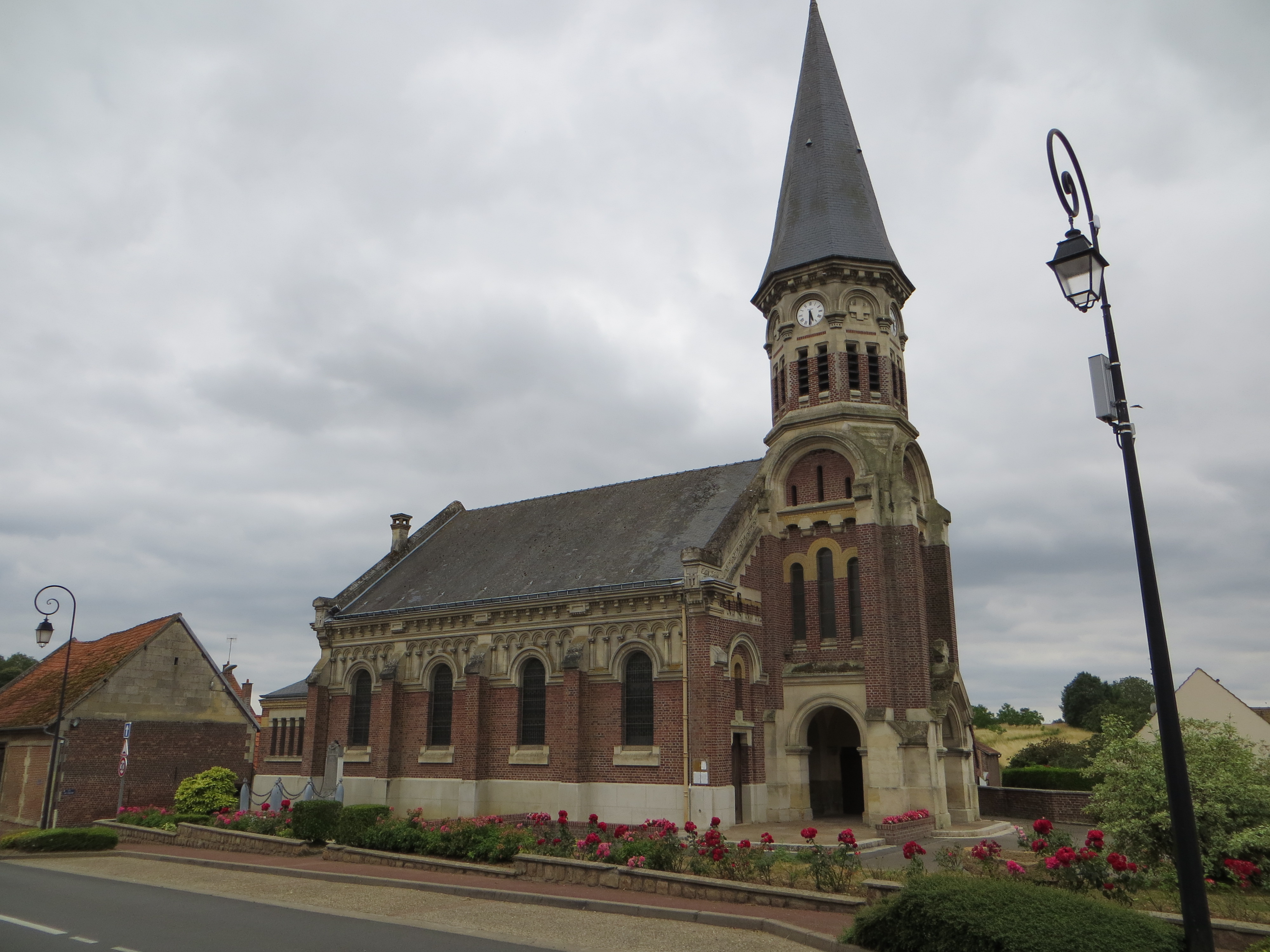 Vue générale de l'église